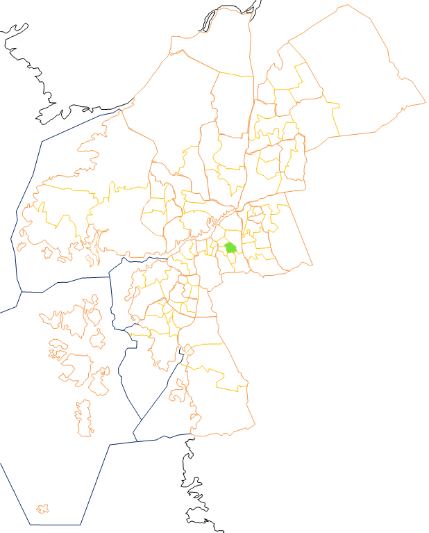 Karta som visar primärområdes belägenhet i Göteborg